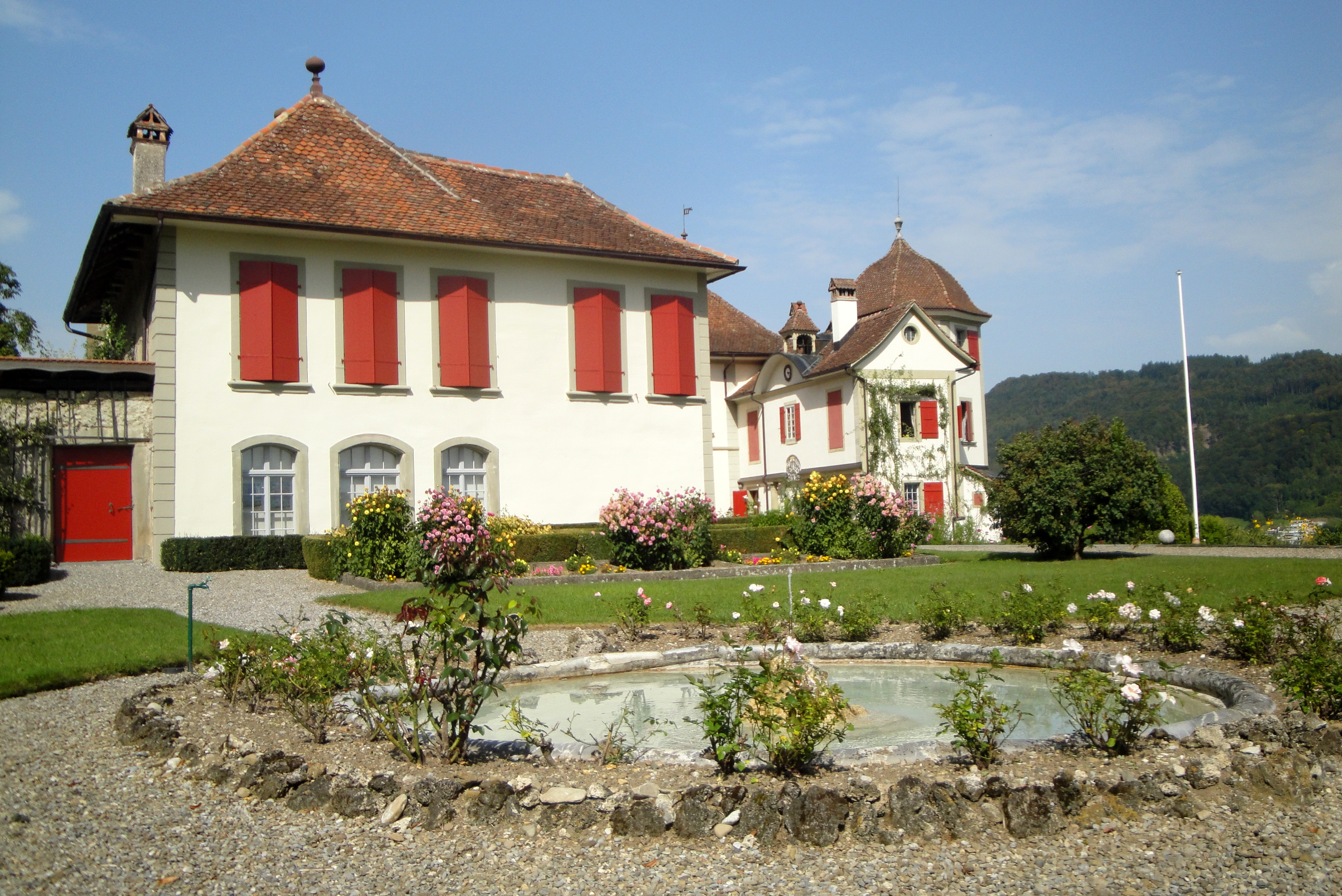 Toffen, Schloss